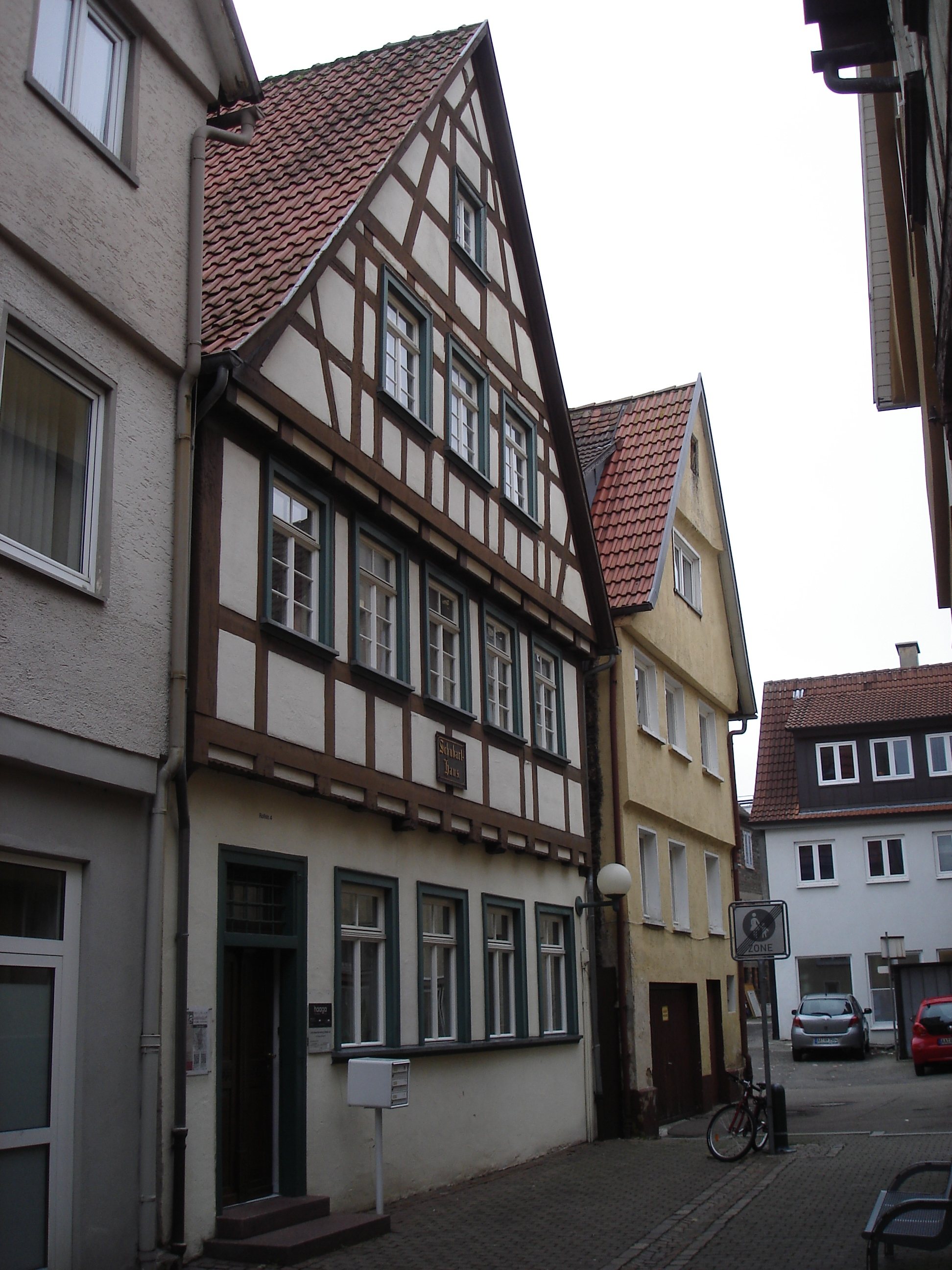 Schubarthaus in Aalen